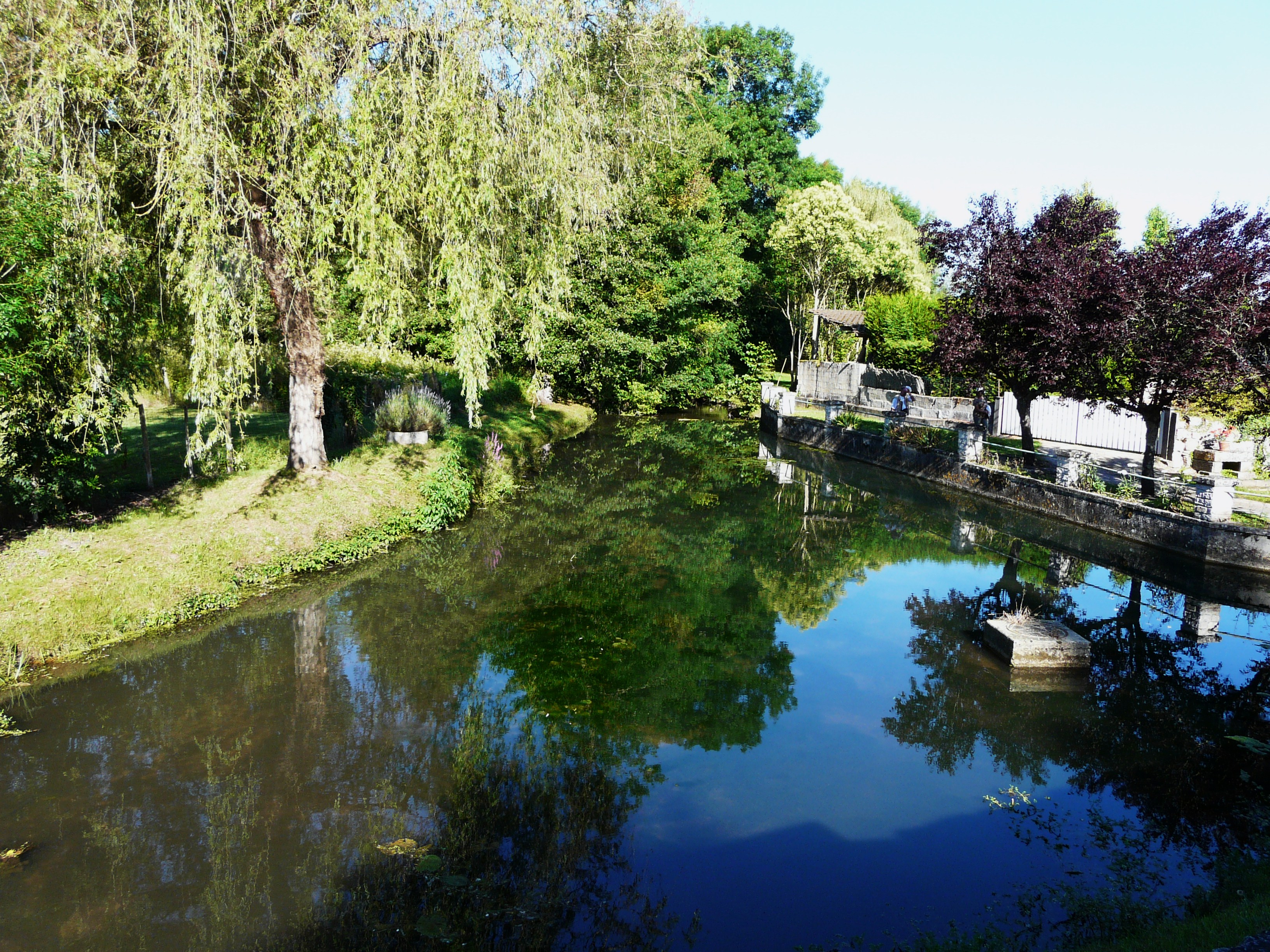 Ruisseau la Belle à Vieux-Mareuil, Dordogne, France. Vue prise en direction de l'aval.